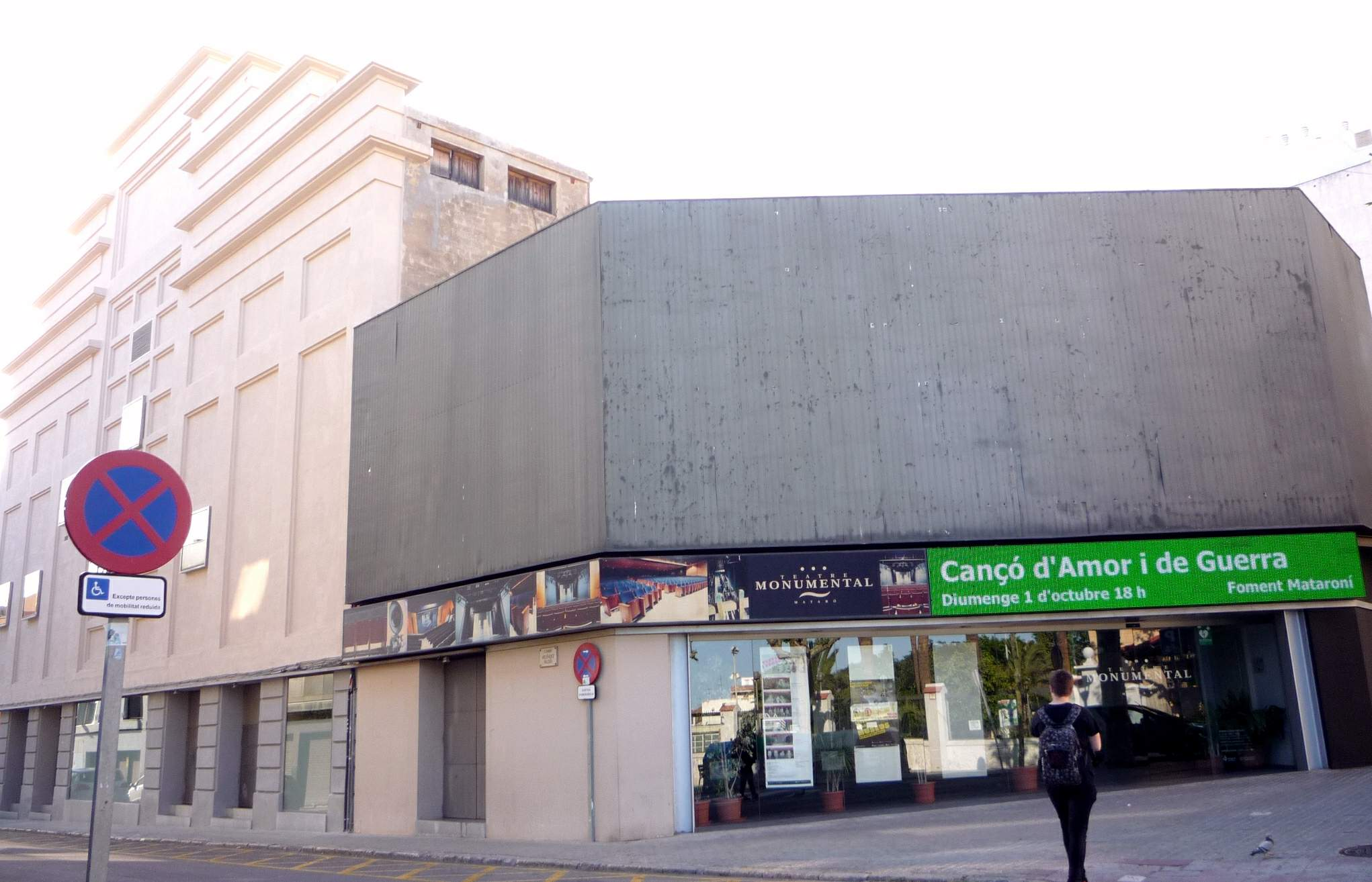 Mataró - Teatre Monumental.